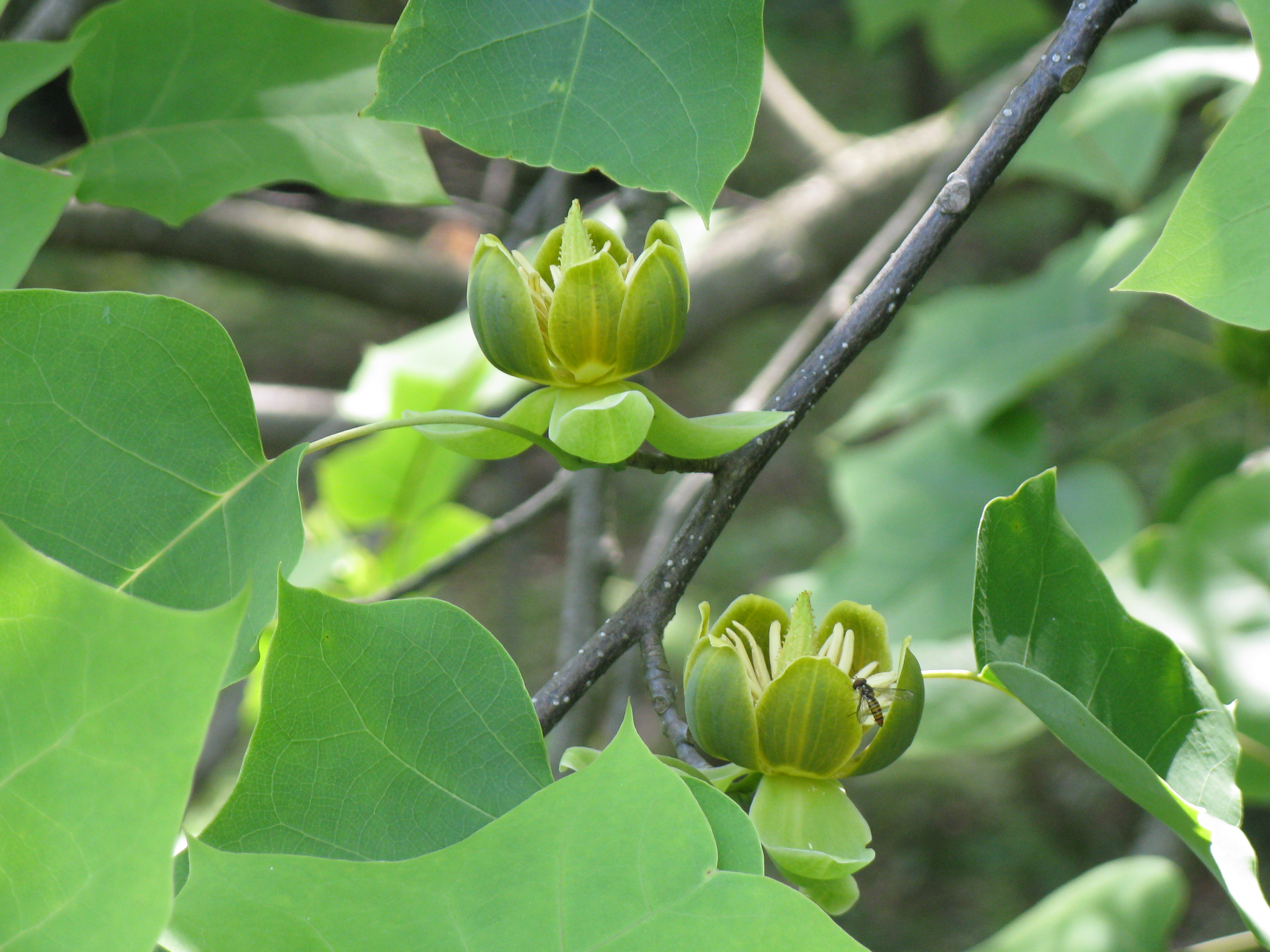 Scientific name Liriodendron chinense